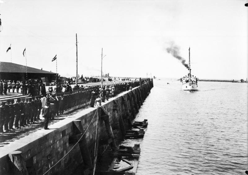 Schutzgebiet Kiautschou Tsingtau : Einweihung des Hafens mit Kanonenboot "Iltis"